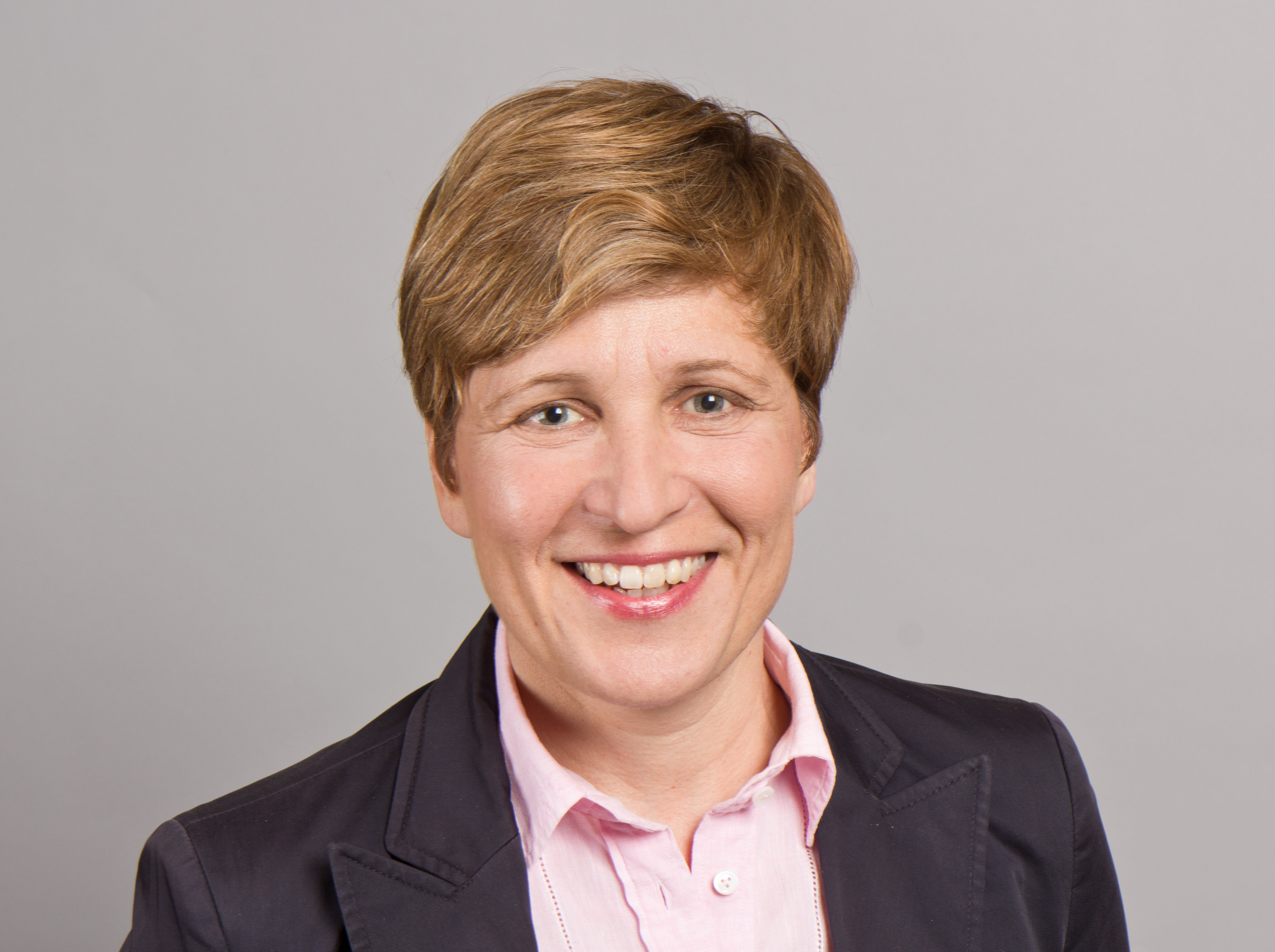 Nicole Razavi. Wikipedia im Landtag – Baden-Württemberg 15.–16. Mai 2013 in Stuttgart Fragen zur Nachnutzung Wenn Sie Fragen zur Nachnutzung dieses Bildes haben, können Sie sich jederzeit gern an wenden Personality rights warningAlthough this work is freely licensed or in the public domain, the person(s) shown may have rights that legally restrict certain re-uses unless those depicted consent to such uses. In these cases, a model release or other evidence of consent could protect you from infringement claims.